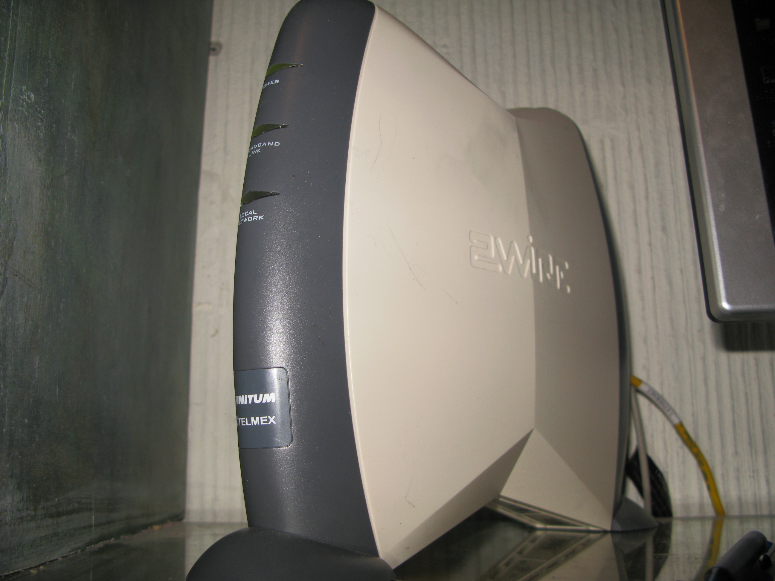 Modem